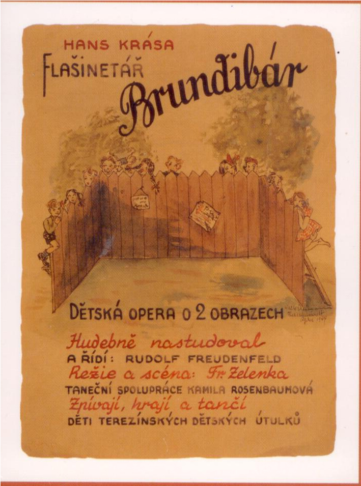 Adolf Hoffmeister, Hans Krása- Brundibár, Plakát Františka Zelenky (1943)